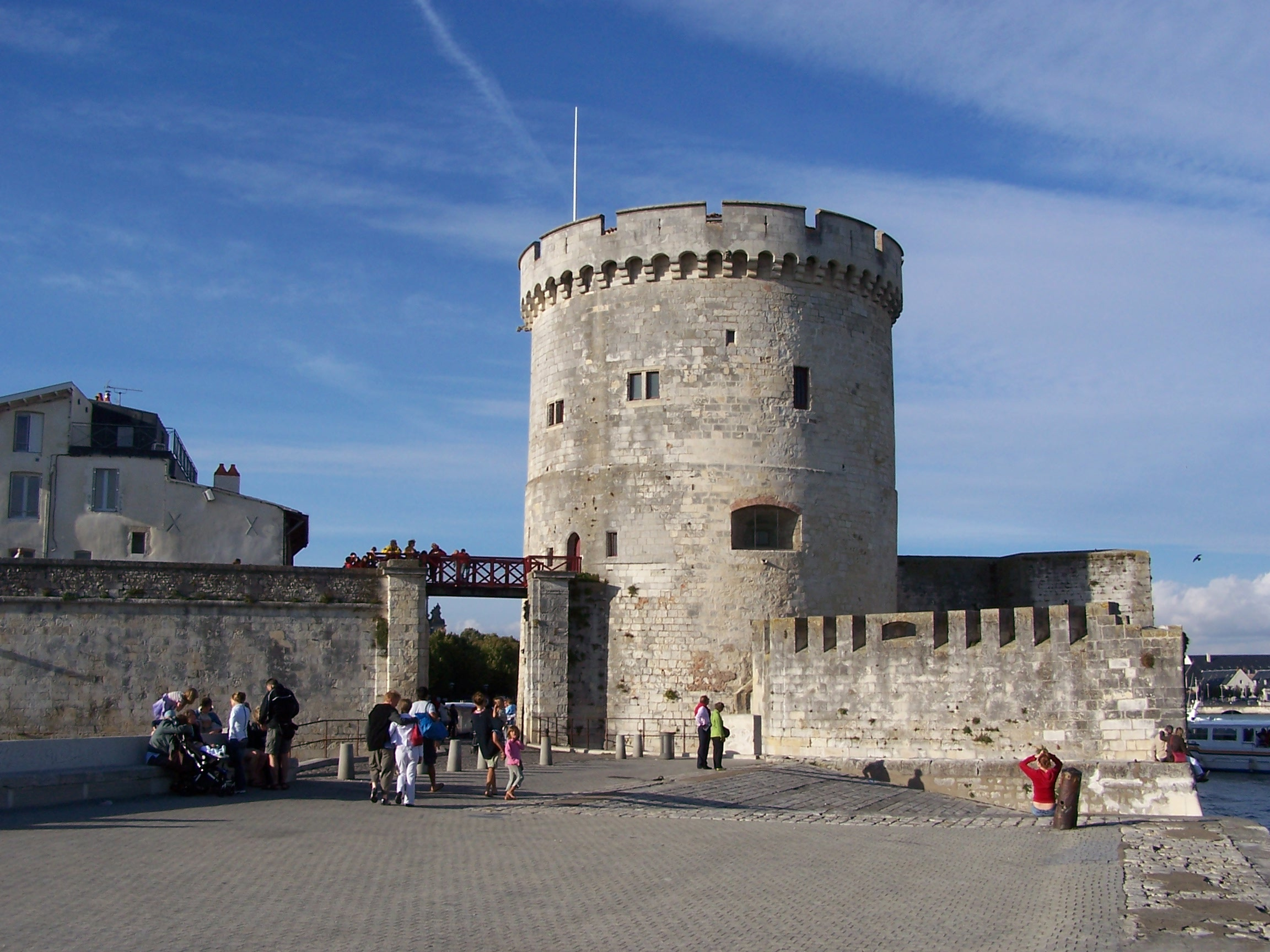 Photographie de la tour de la Chaîne, qui est, avec la tour Saint-Nicolas et la tour de la Lanterne, l'une des trois tours du front de mer de La Rochelle, et l'une des deux tours emblématiques du Vieux-Port. Elle a été classée monument historique en 1879.